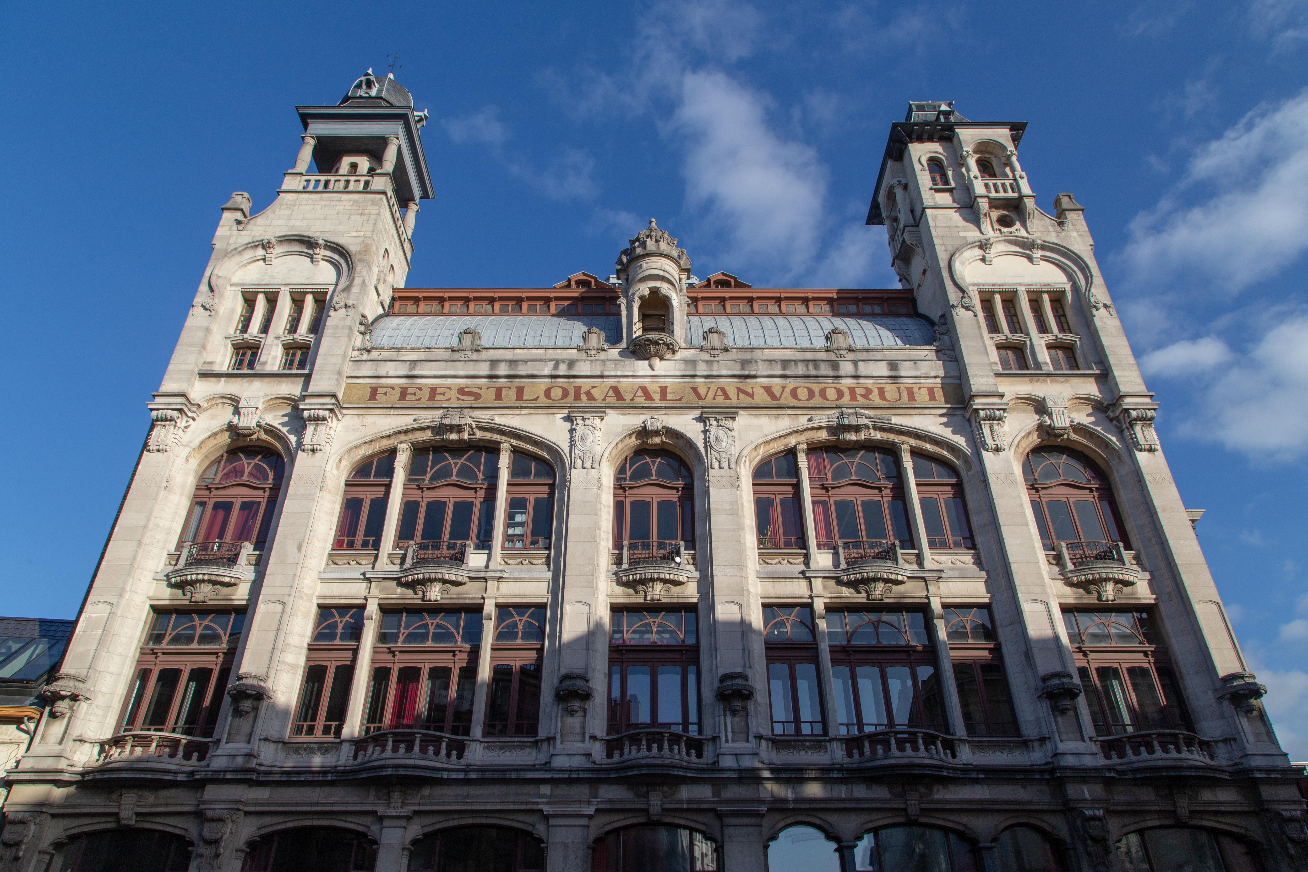 Feestlokaal van Vooruit, Gent